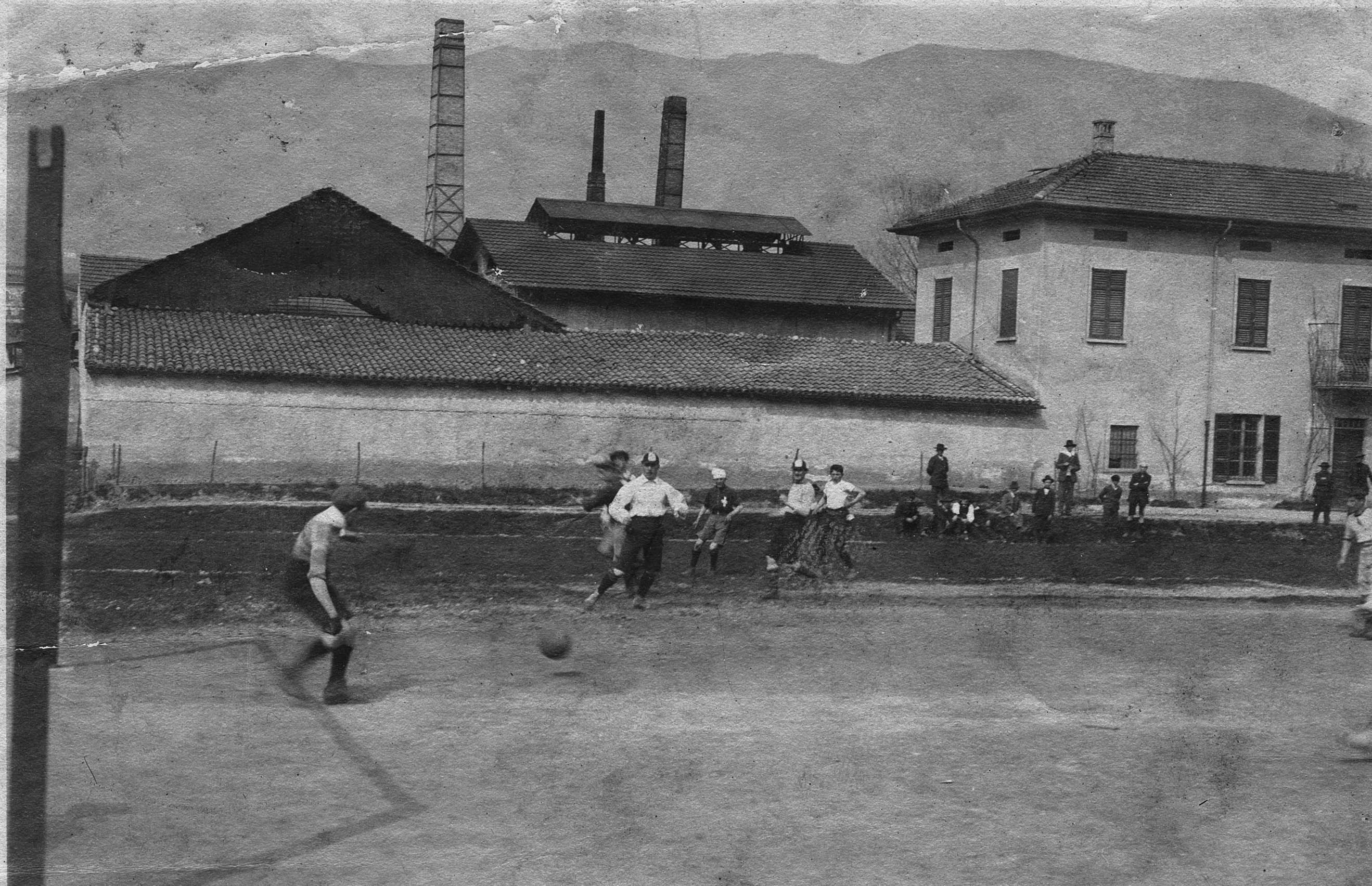 Chiasso, Campo del gas. Questo terreno fu il campo da gioco del FC Chiasso dal 1906 al 1910. Nel 1908 tenne a battesimo il derby tra Milan e Inter.